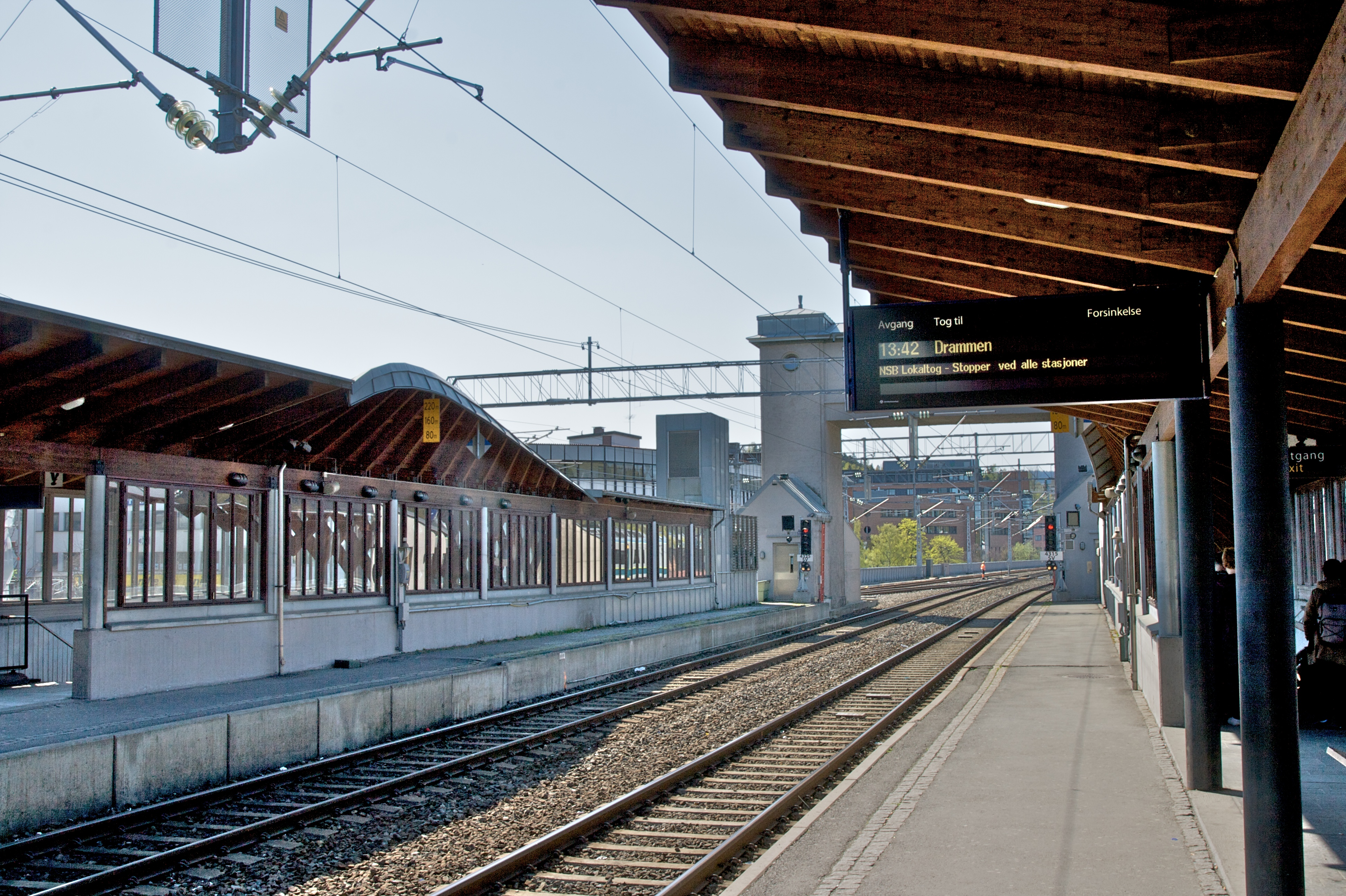 Sandvika stasjon i Bærum.